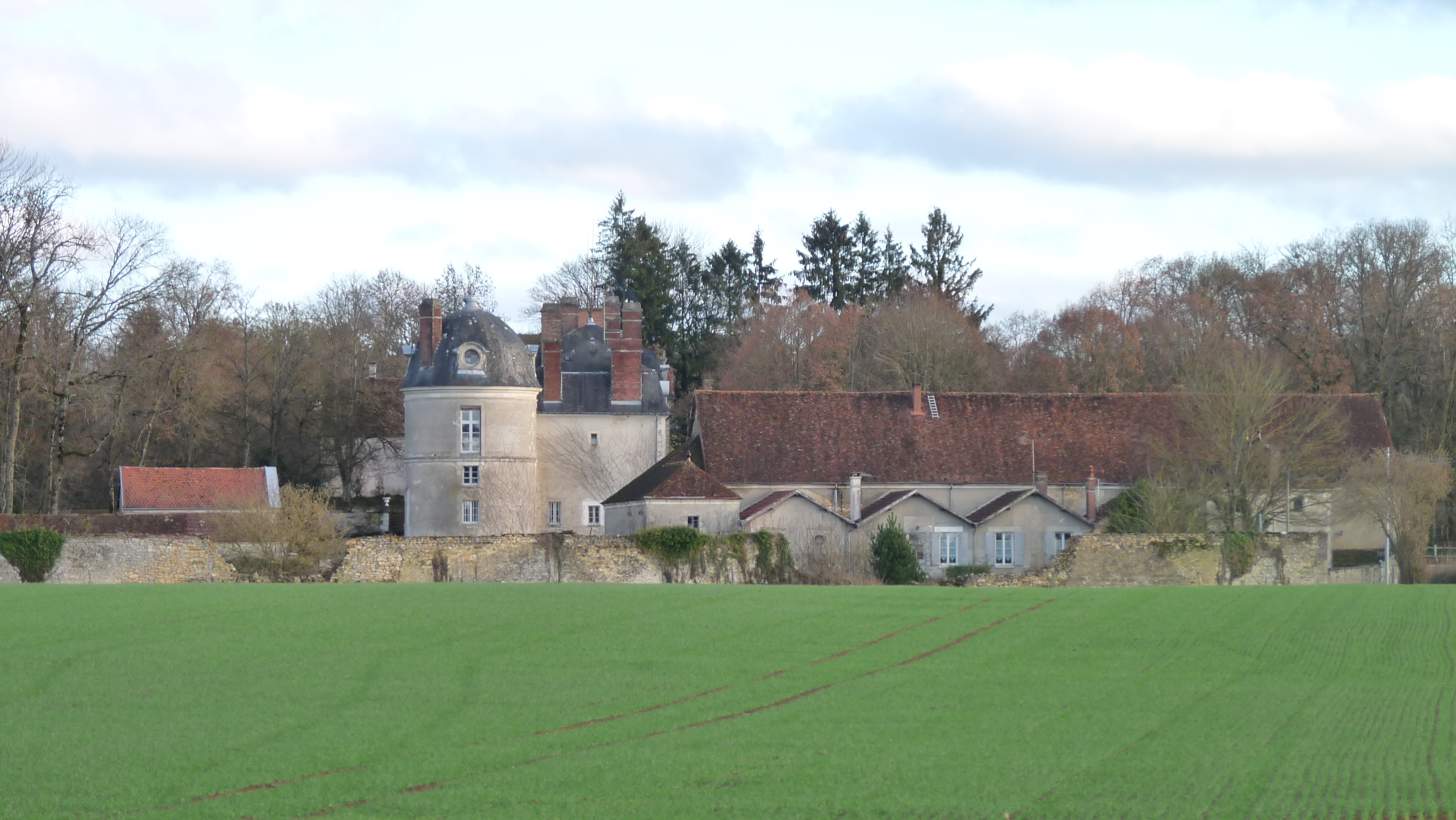 Extérieur du château des Barres depuis la route, commune de Sainpuits département de l'Yonne